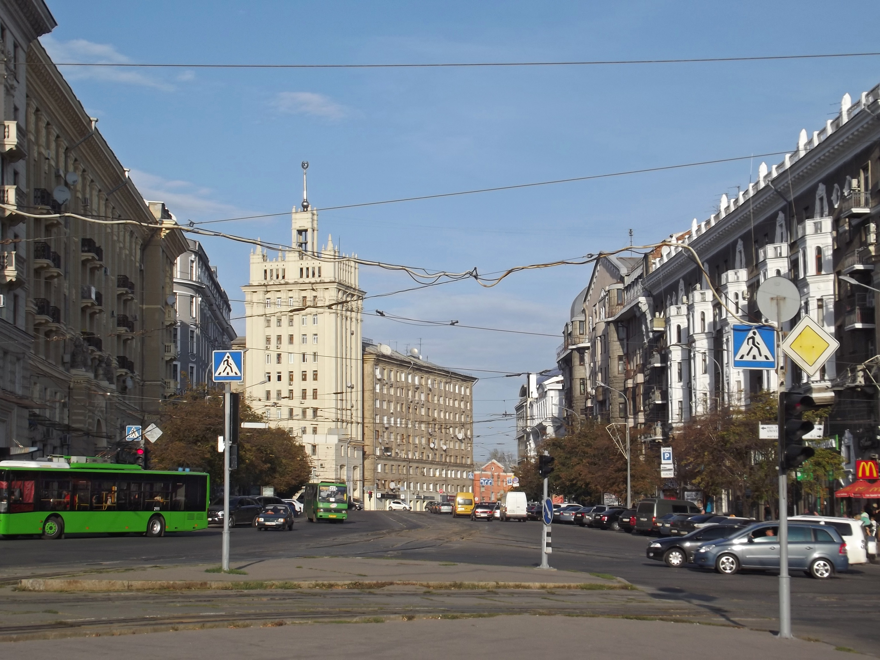 Павловская площадь в Харькове